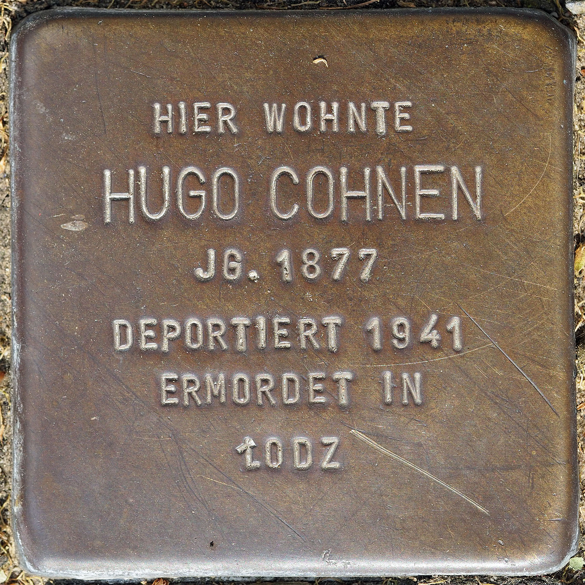 Stolpersteine MG: Cohnen, Hugo